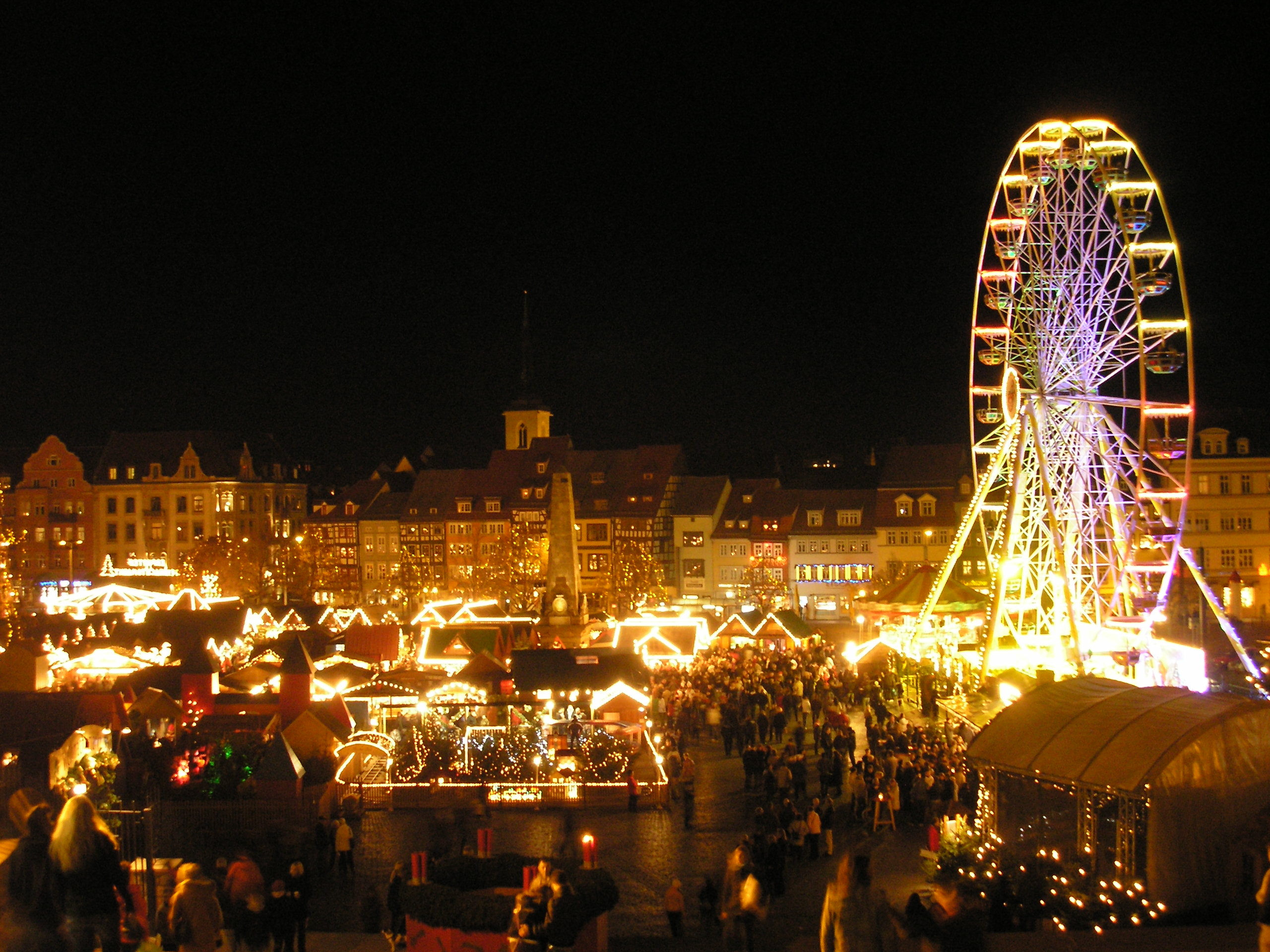 Blick von den Domstufen über den Erfurter Weihnachtsmarkt.